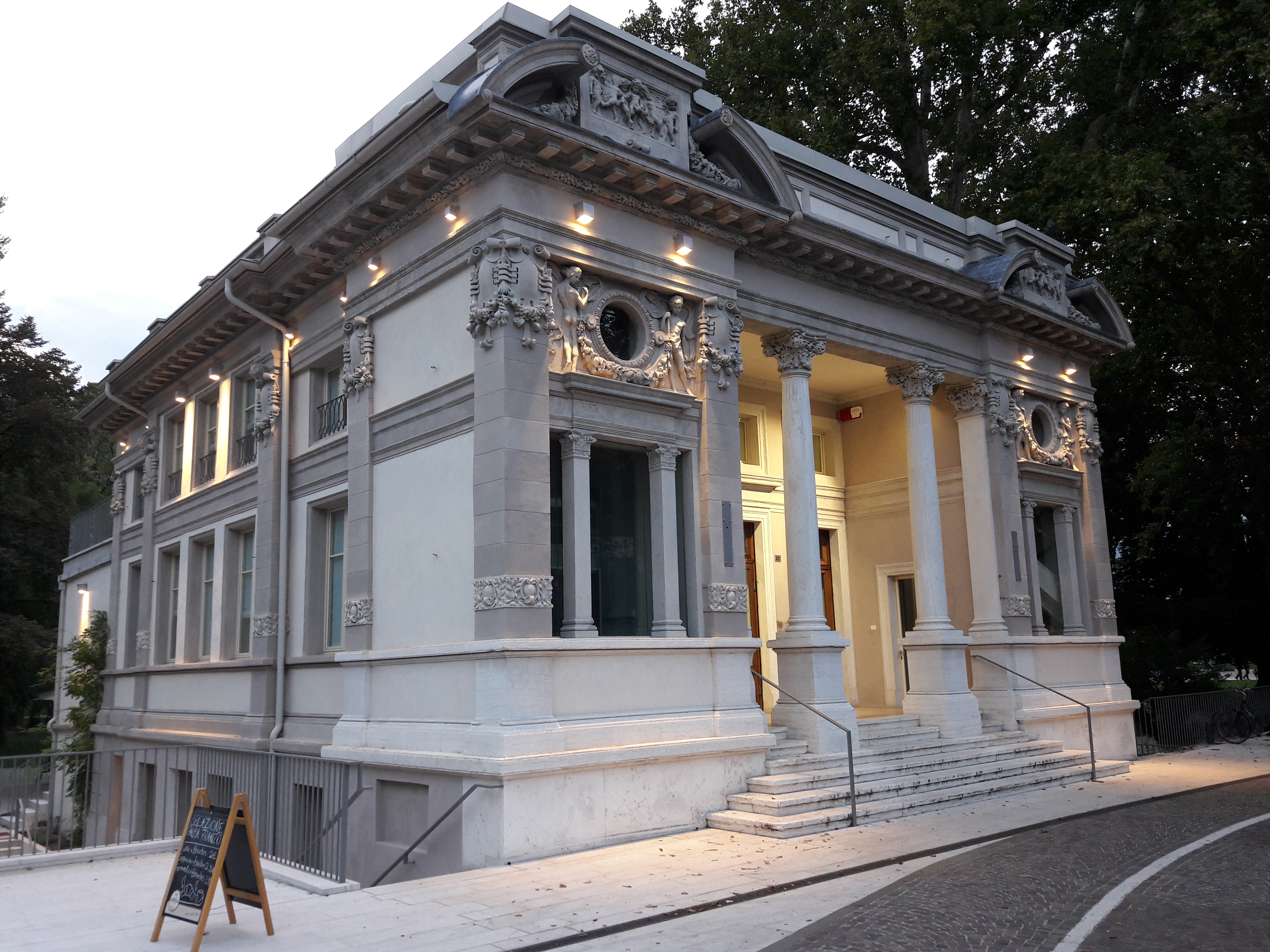 Palazzina Liberty This is a photo of a monument which is part of cultural heritage of Italy.